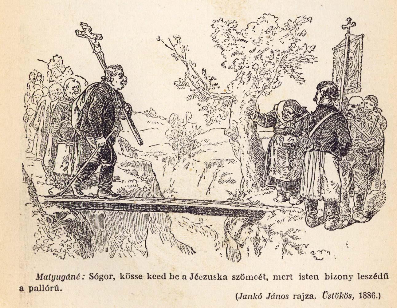 Jankó János grafikus és festő rajza a Jókai Mór alapította Üstökös című élclapban